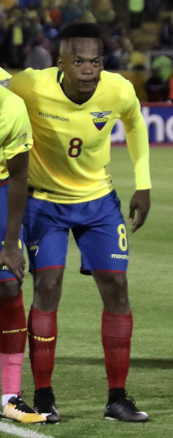 Quito, 10 oct (Andes).- Con tres tantos Argentina espantó los fantasmas de la eliminación, clasificó a su décima octava Copa del Mundo y venció 3-1 a un Ecuador que inició ganando el compromiso, disputado en el estadio Atahualpa de Quito, pero que no supo contener a uno de los mejores jugadores del mundo. ANDES/Micaela Ayala V.